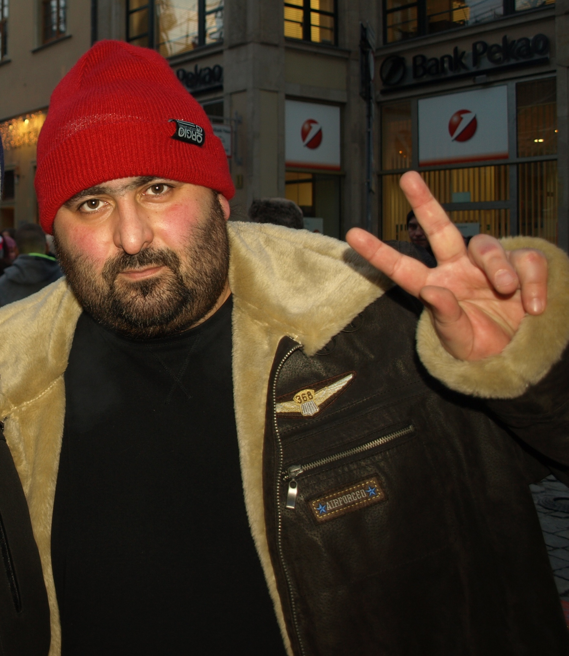 Adam Asanov